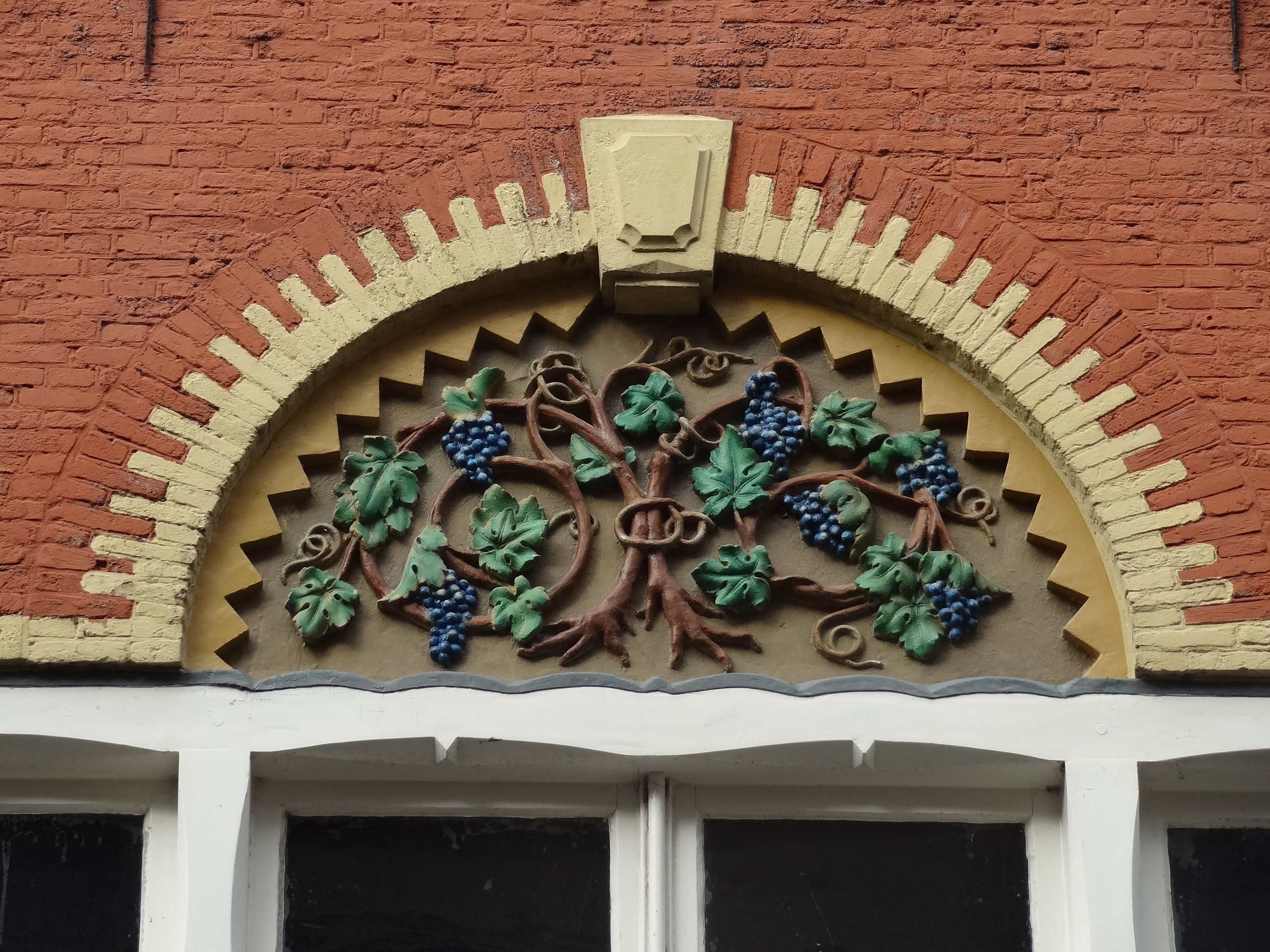 Versierde boogtrommel in de gevel van de Kerkstraat 11 in Hoorn